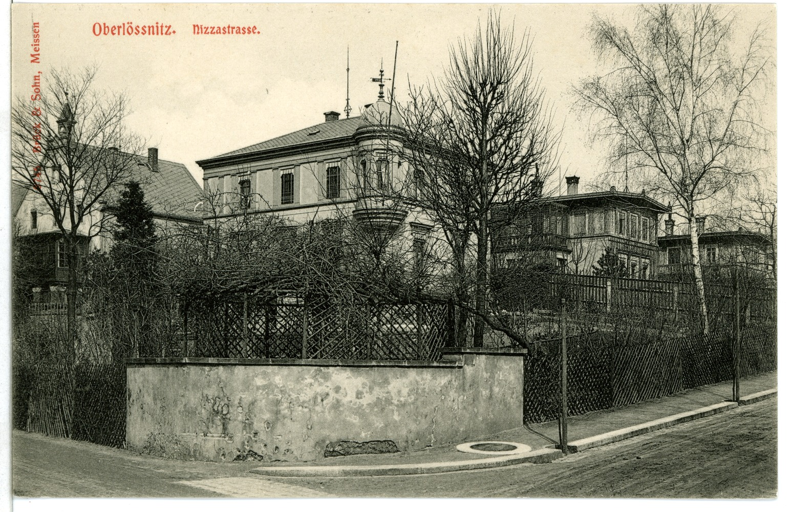 Radebeul; Oberlößnitz - Nizzastraße This postcard is from publisher Brück & Sohn in Meißen ( postcard has a unique number 08746 and is available in a higher resolution at the publisher. This images was uploaded in a cooperation project between Wikipedians and the publisher.